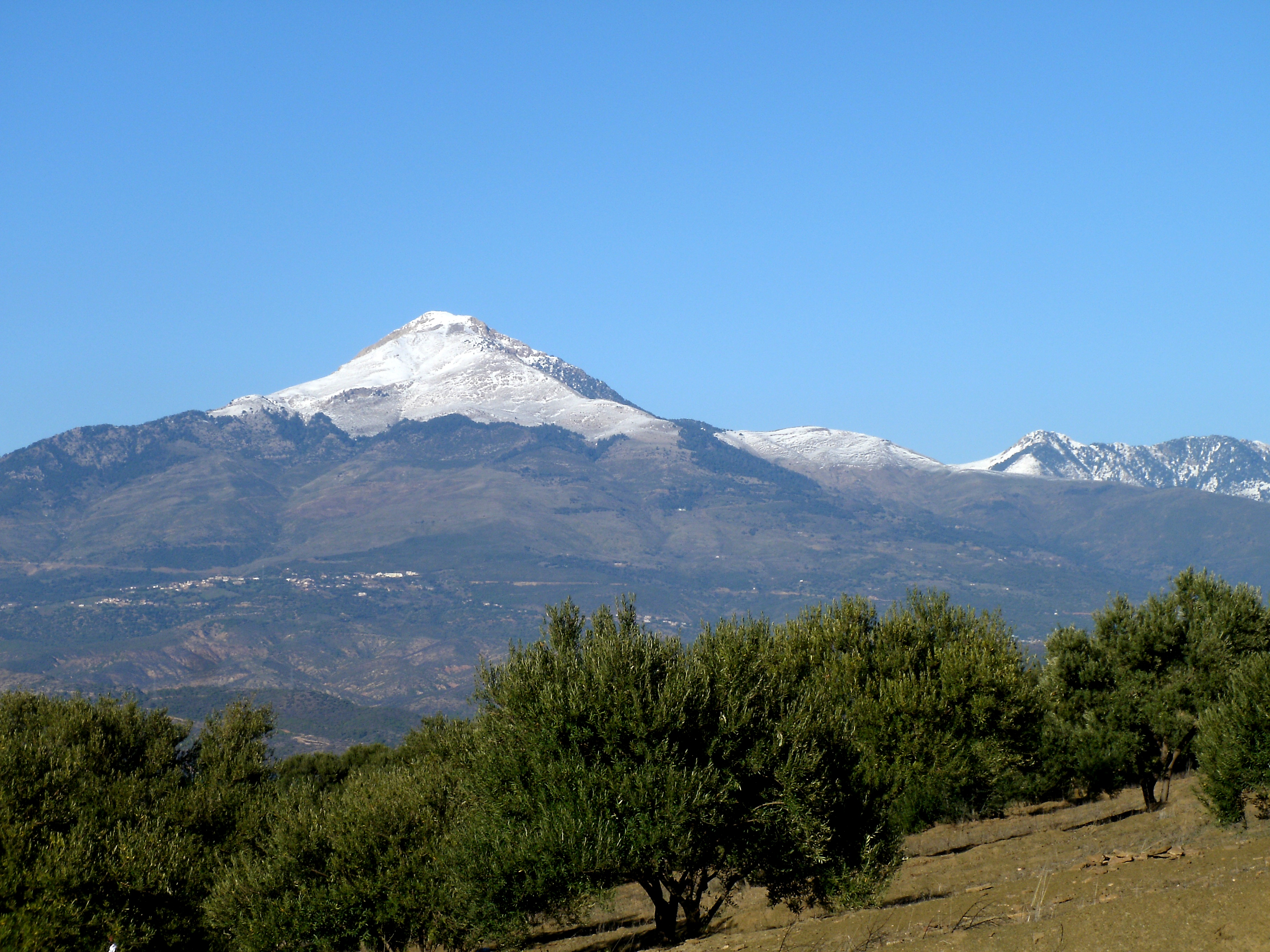 1er janvier 2012, le Lalla Khadidja enneigé